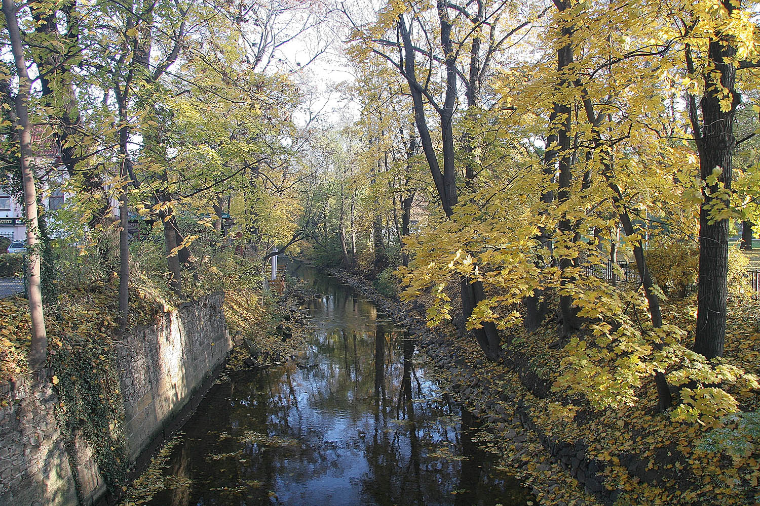 Čertovka